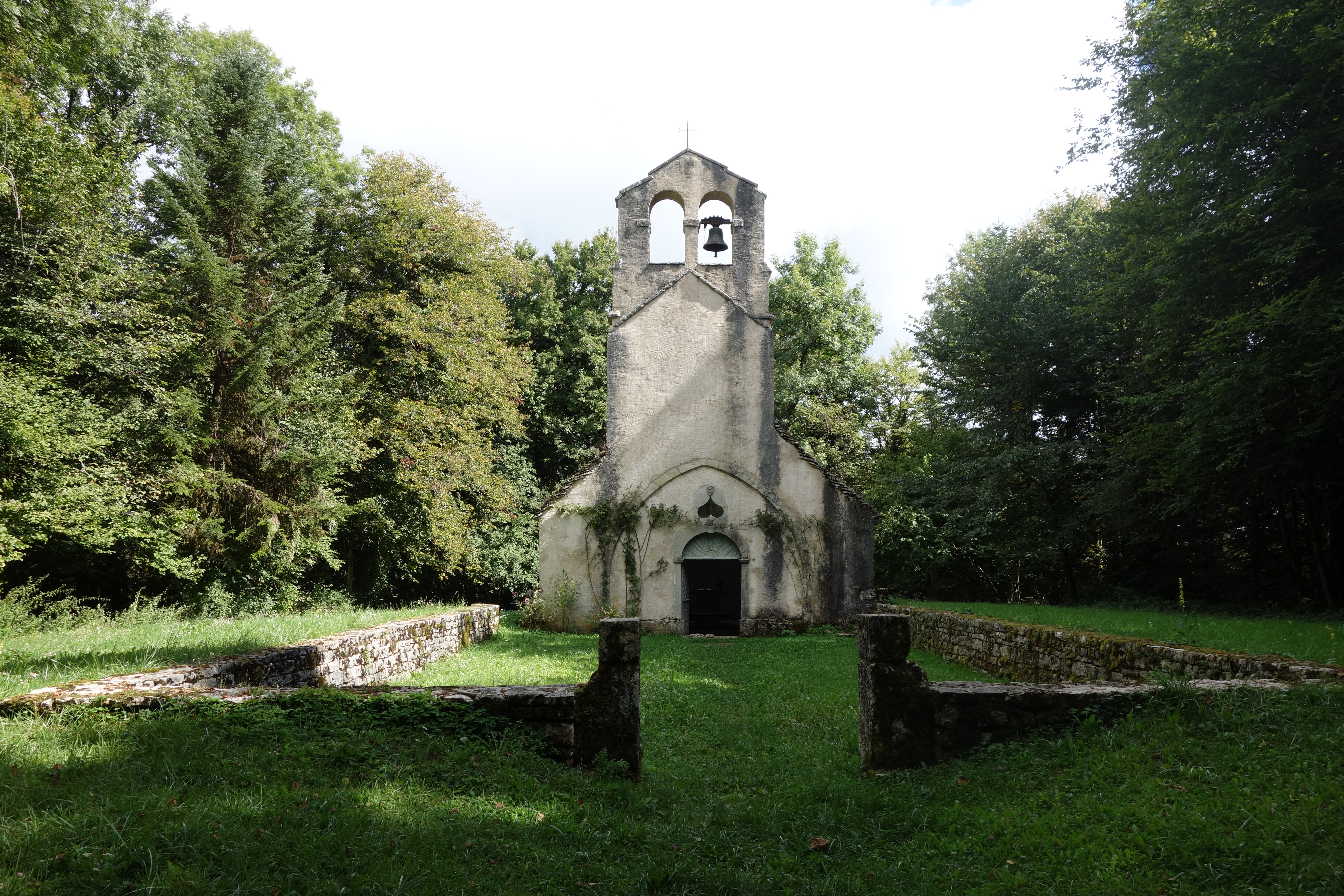 Charézier -Ermitage de Saint-Sorlin (XIXe s) - Jura